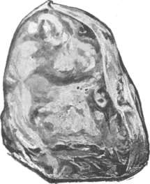 Croquis du diamant Excelsior brut